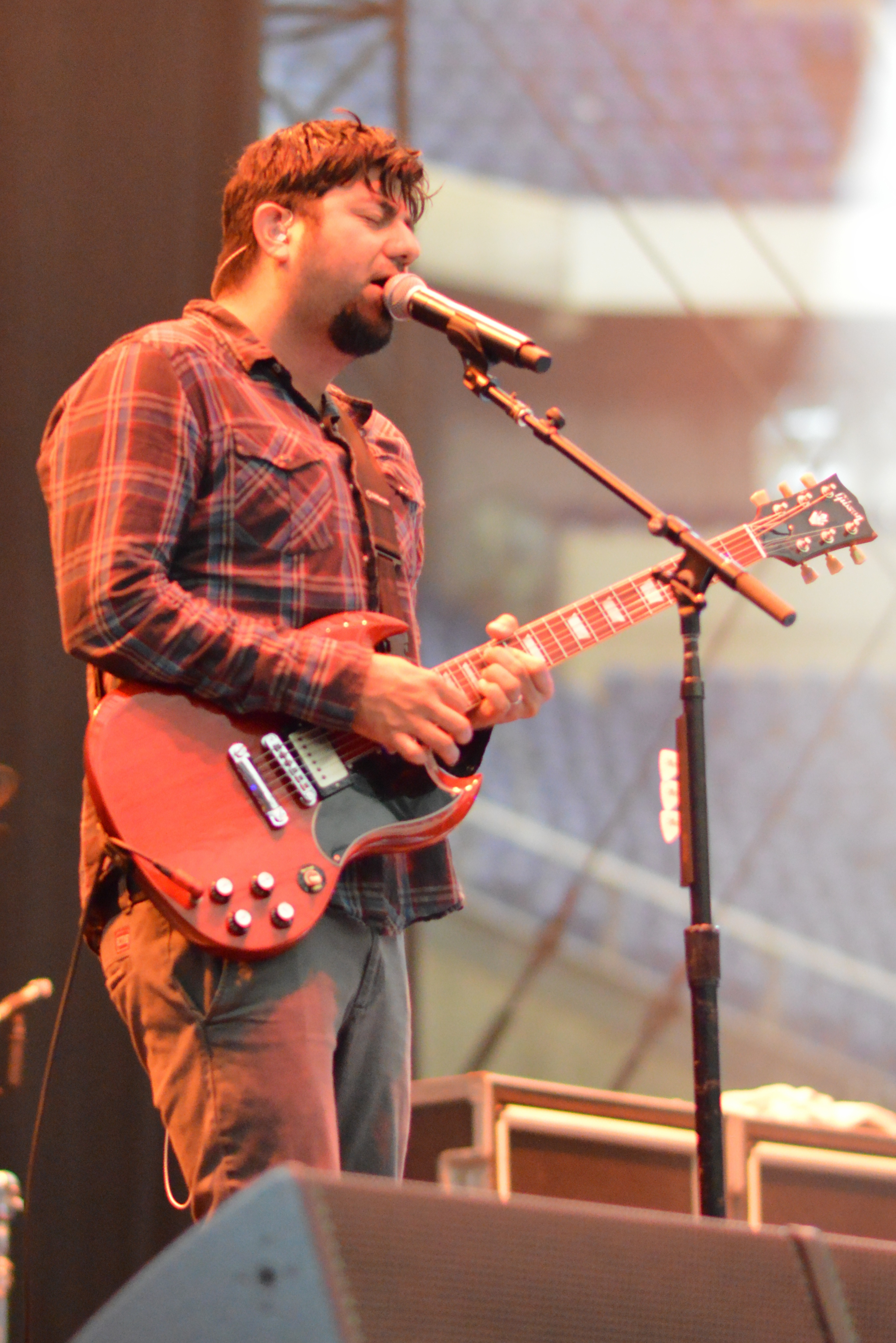 Deftones bei Rock im Pott 2013